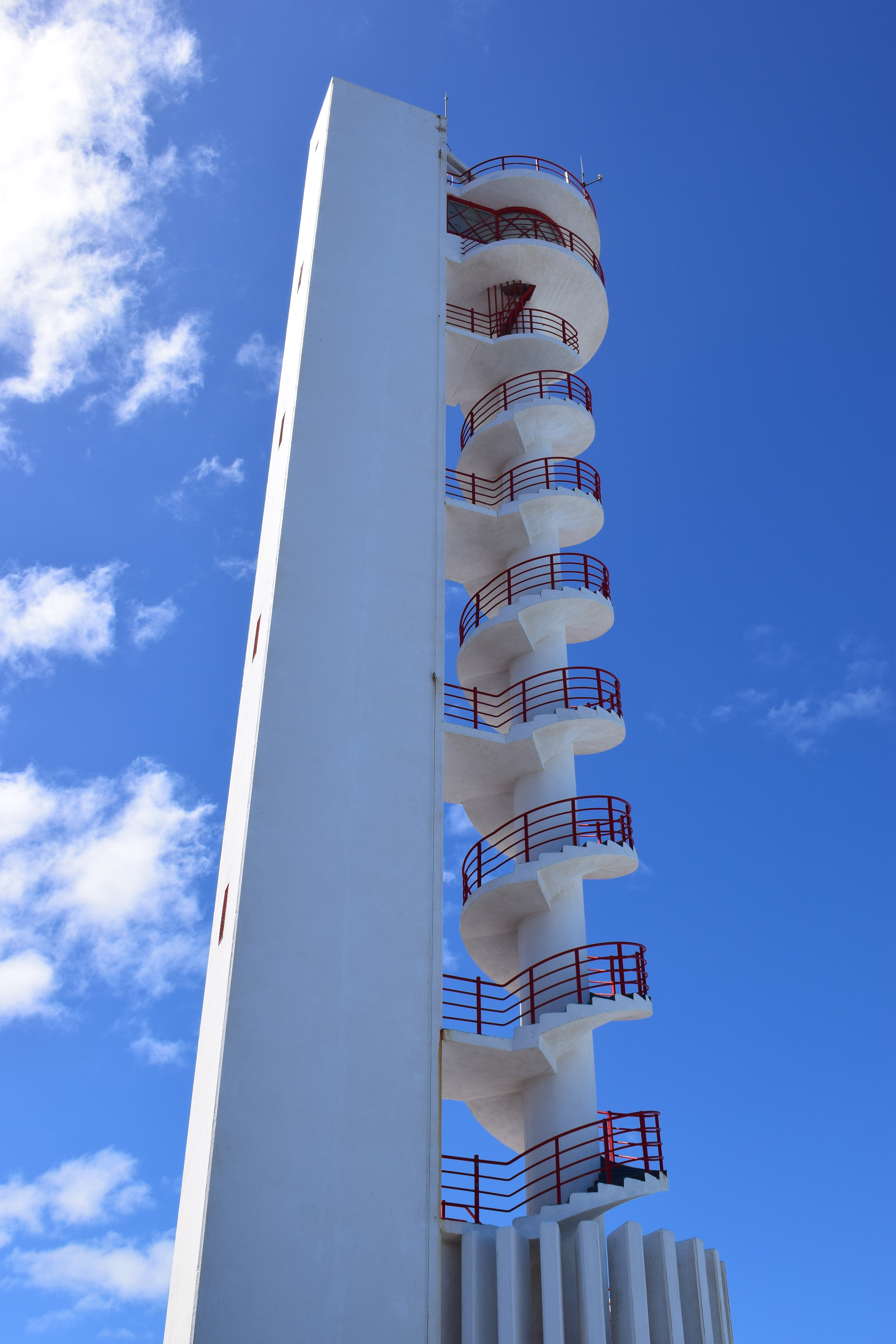 Der Leuchtturm von Buenavista, Teneriffa.